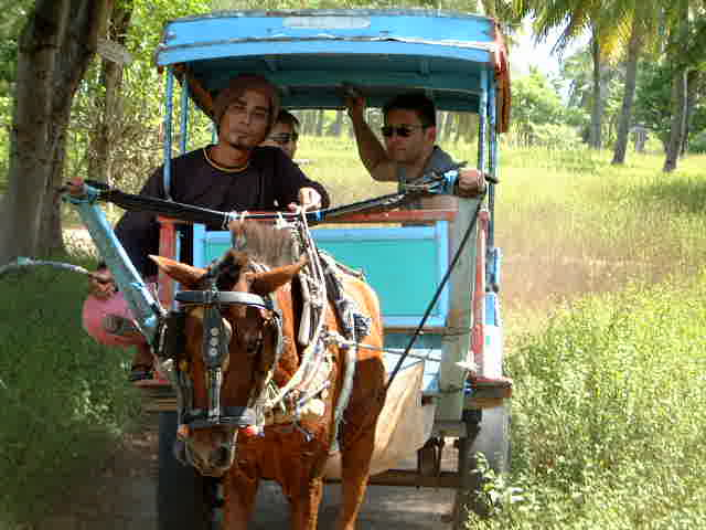 in Gili Meno